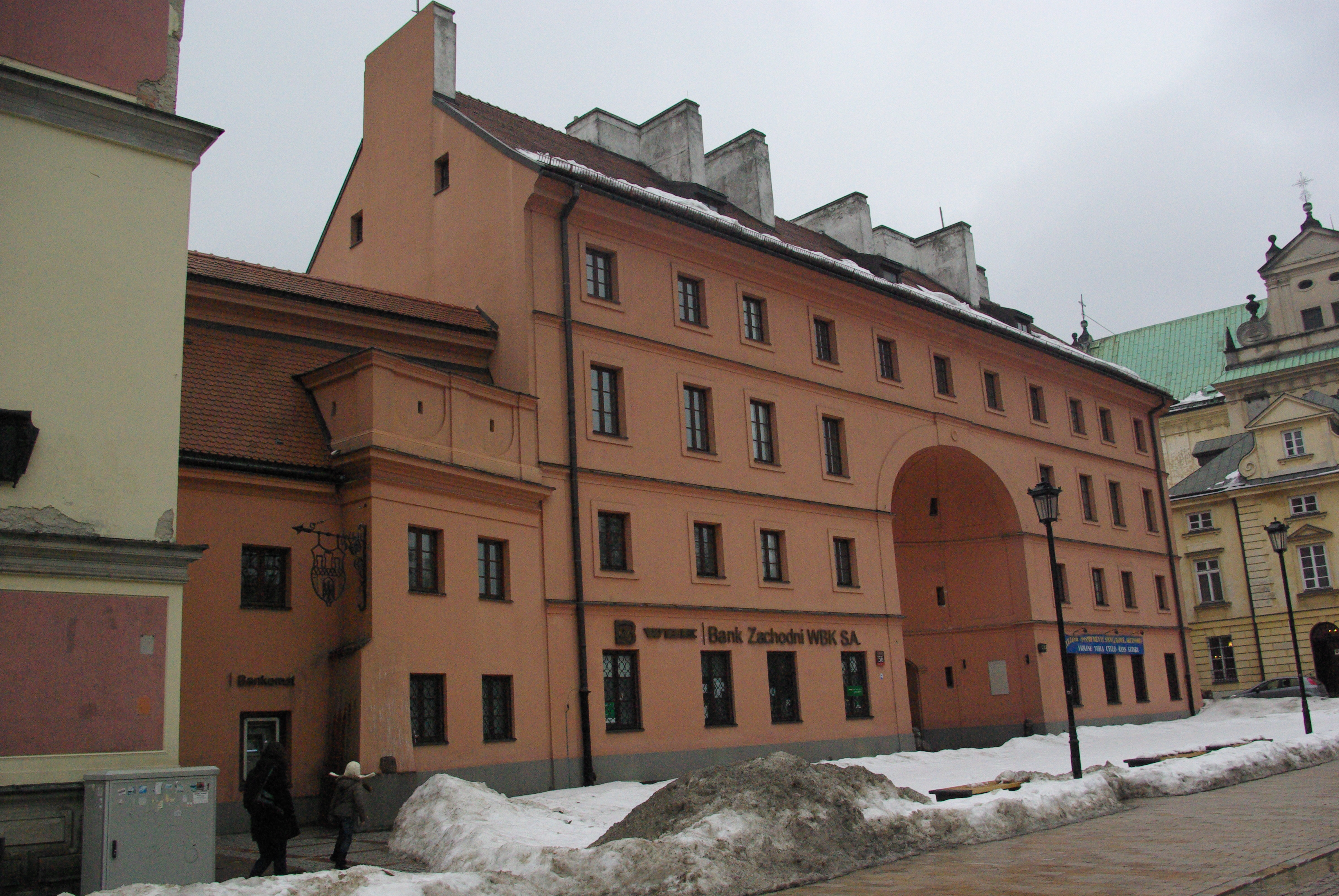 Dziekanka - widok z lewej